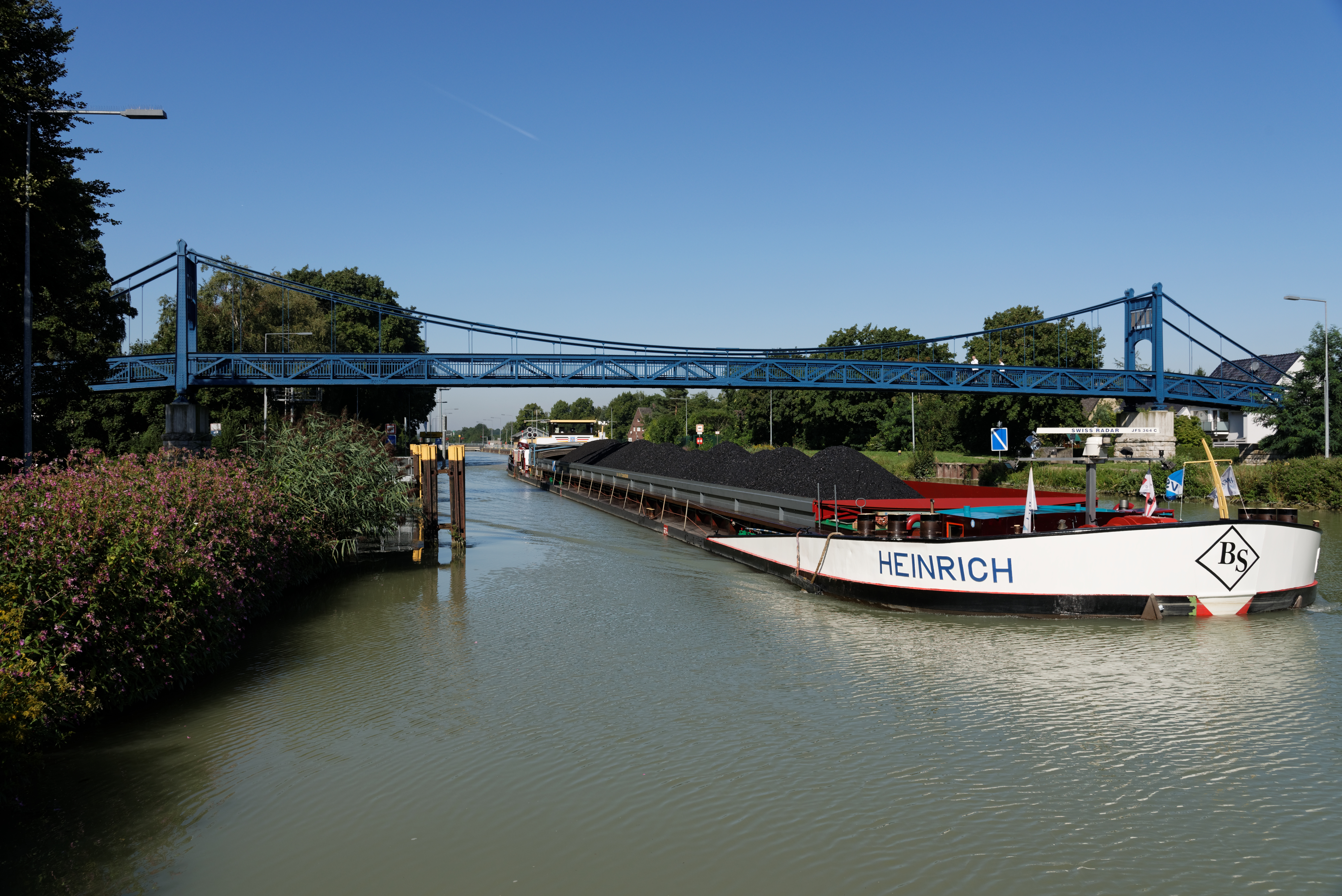 Fußgängerhängebrücke Schulweg-Steg im Stadtbezirk Hamm-Uentrop der kreisfreien Stadt Hamm in Nordrhein-WestfalenThis is a photograph of an architectural monument., no. 149